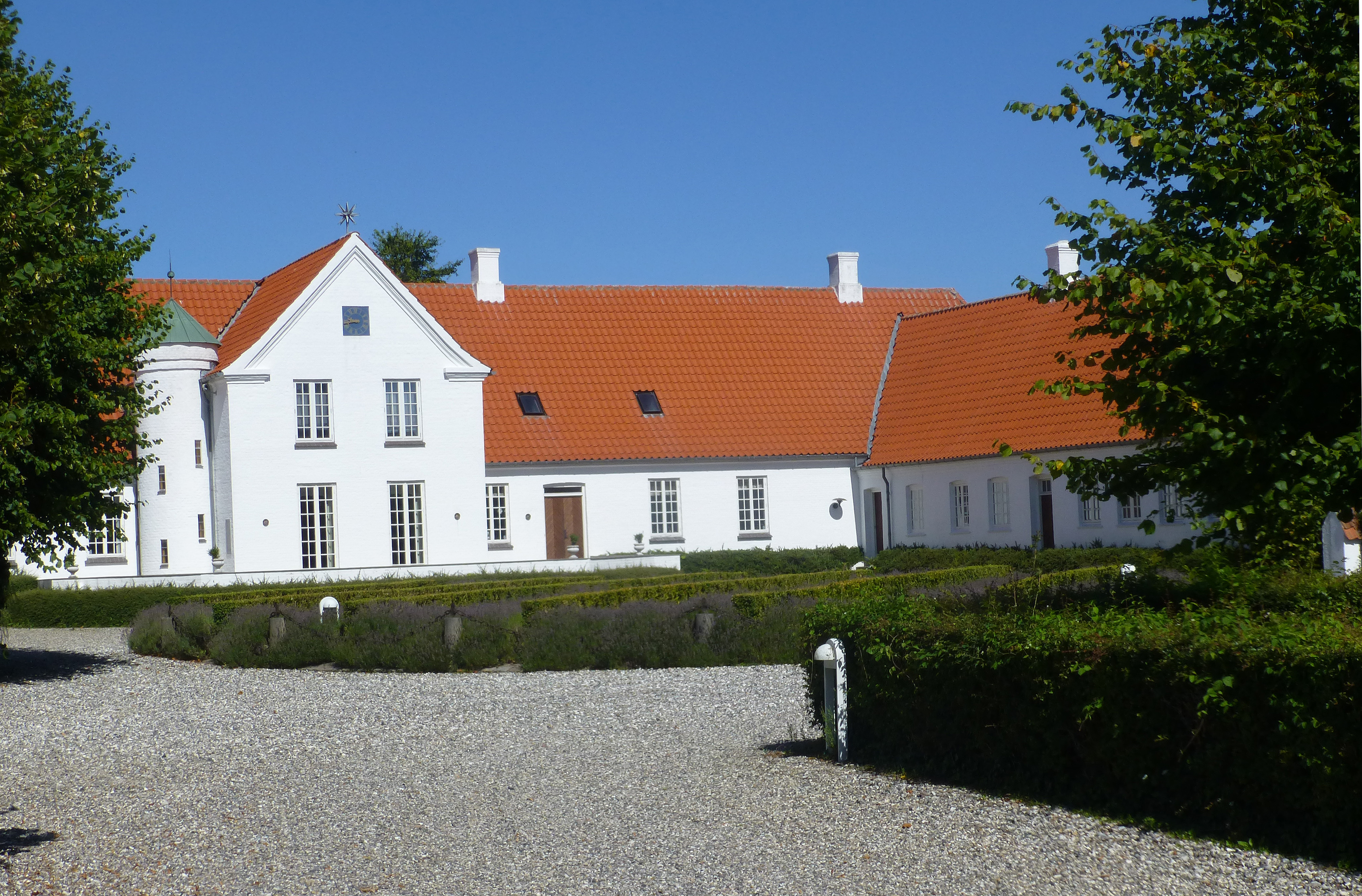 An estate in Sødring Kirke Gjerlev Herred, Randers Kommune, Jylland, Denmark